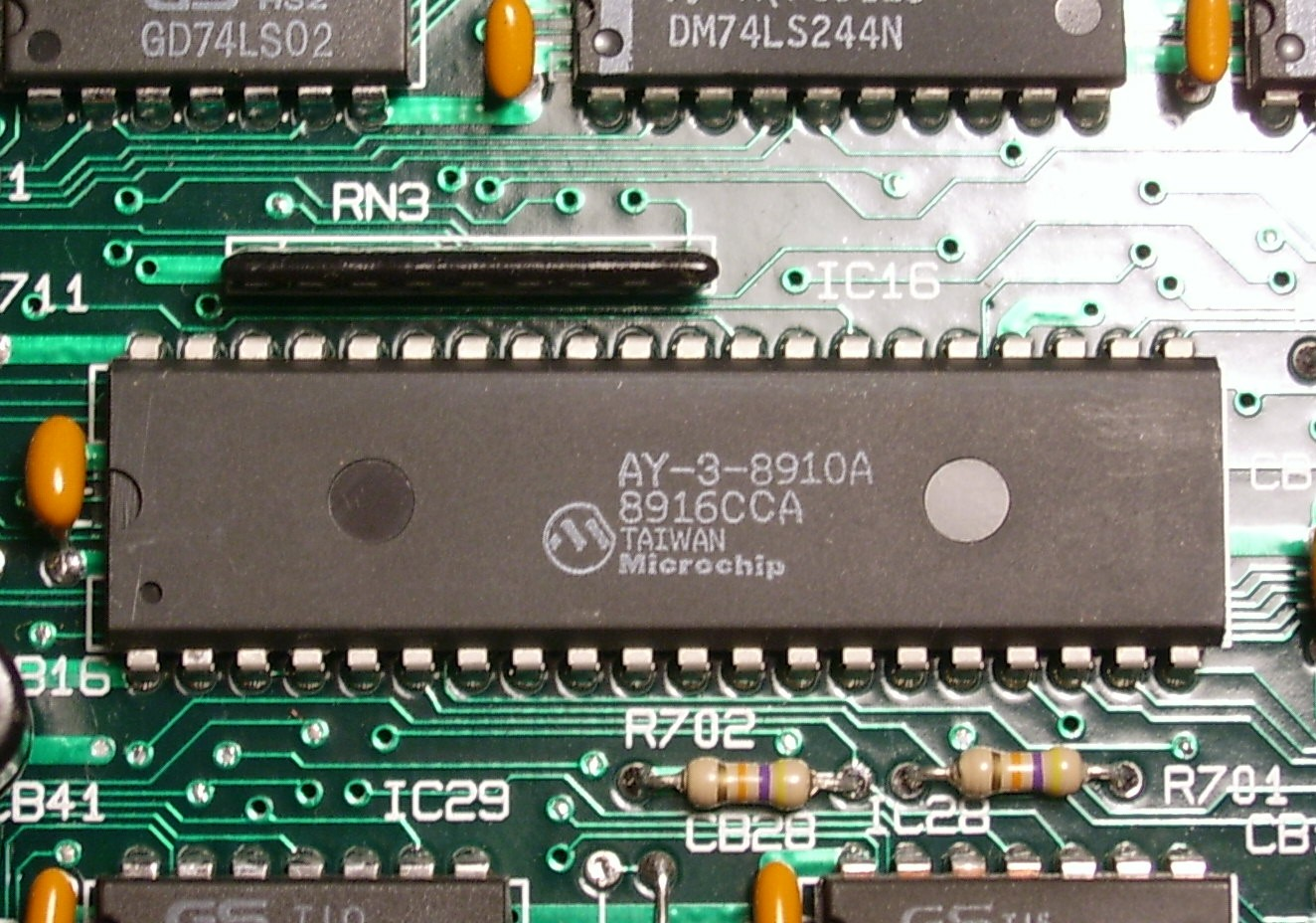 Микросхема звукогенератора AY-3-8910A производства Microchip (Тайвань) на плате компьютера MSX2 Daewoo CPC300E